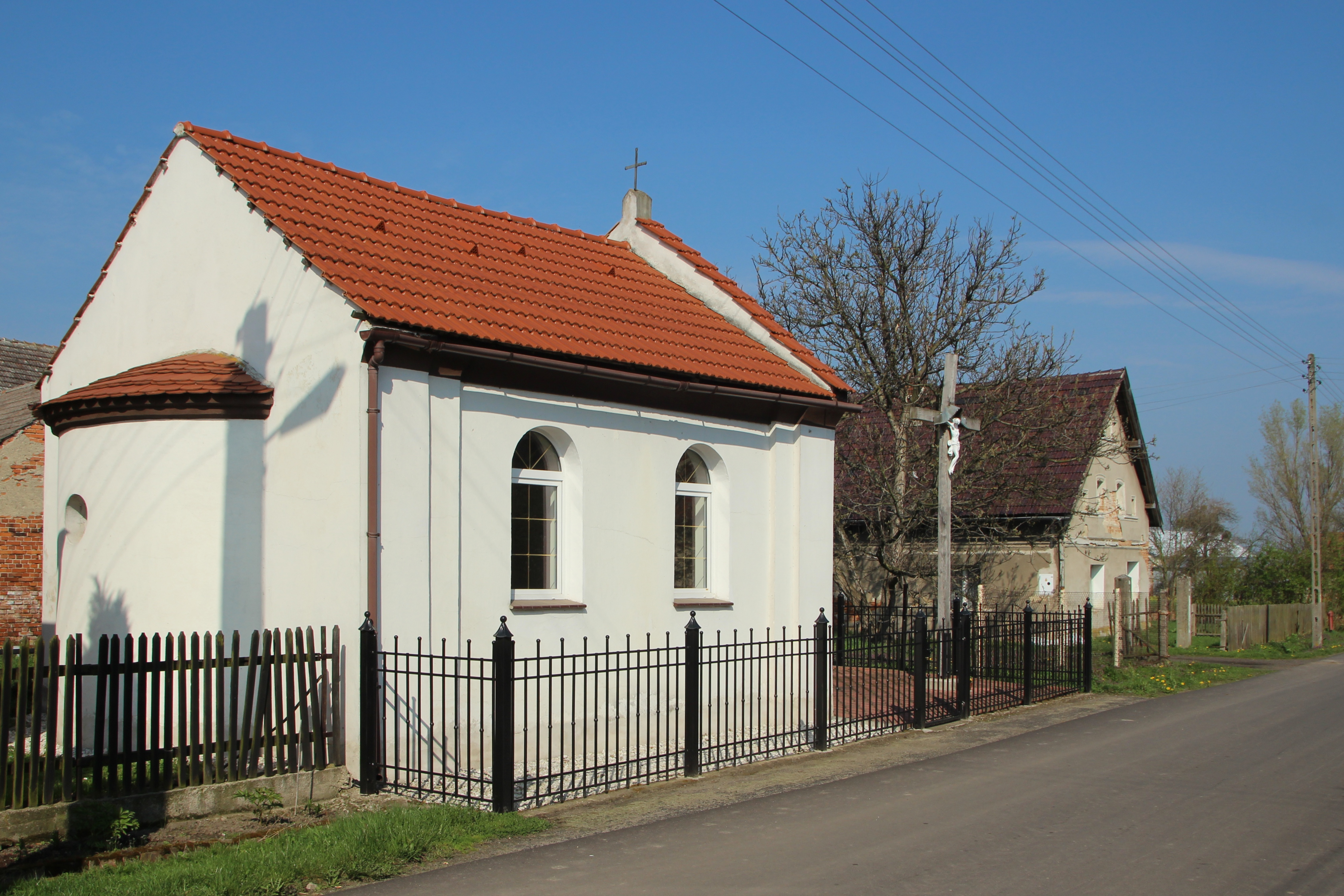 Kuropas – wieś w Polsce położona w województwie opolskim, w powiecie nyskim, w gminie Korfantów.